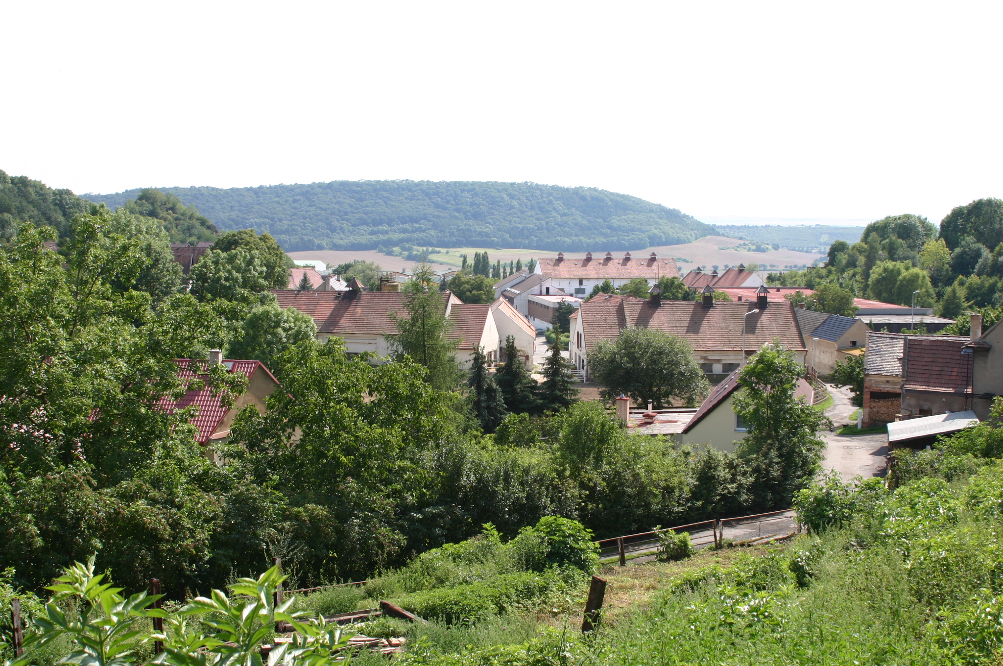 Osada Svinčice v okrese Most.